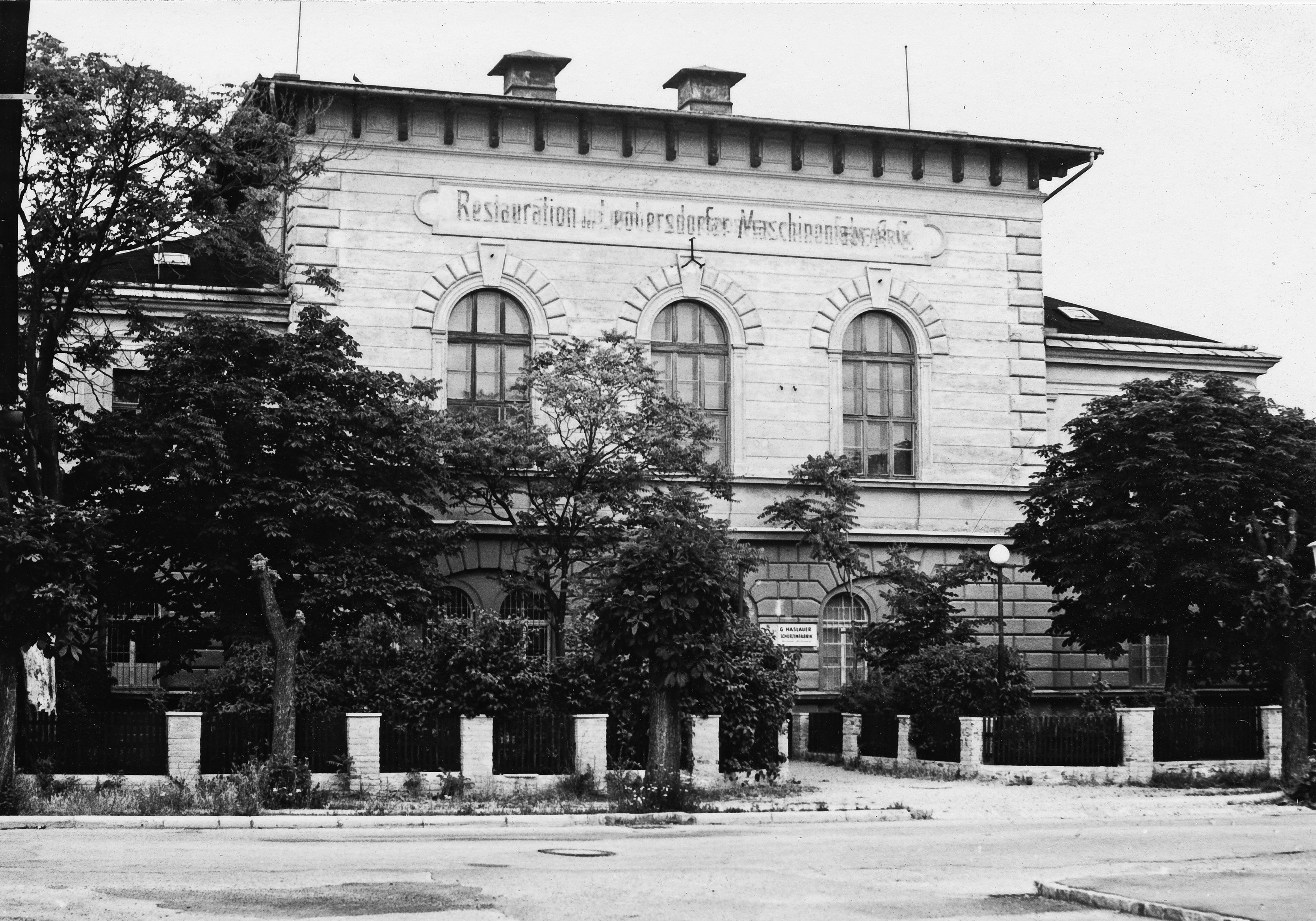 Leobersdorf (Siebenhaus), Restauration, Arbeiterkolonie